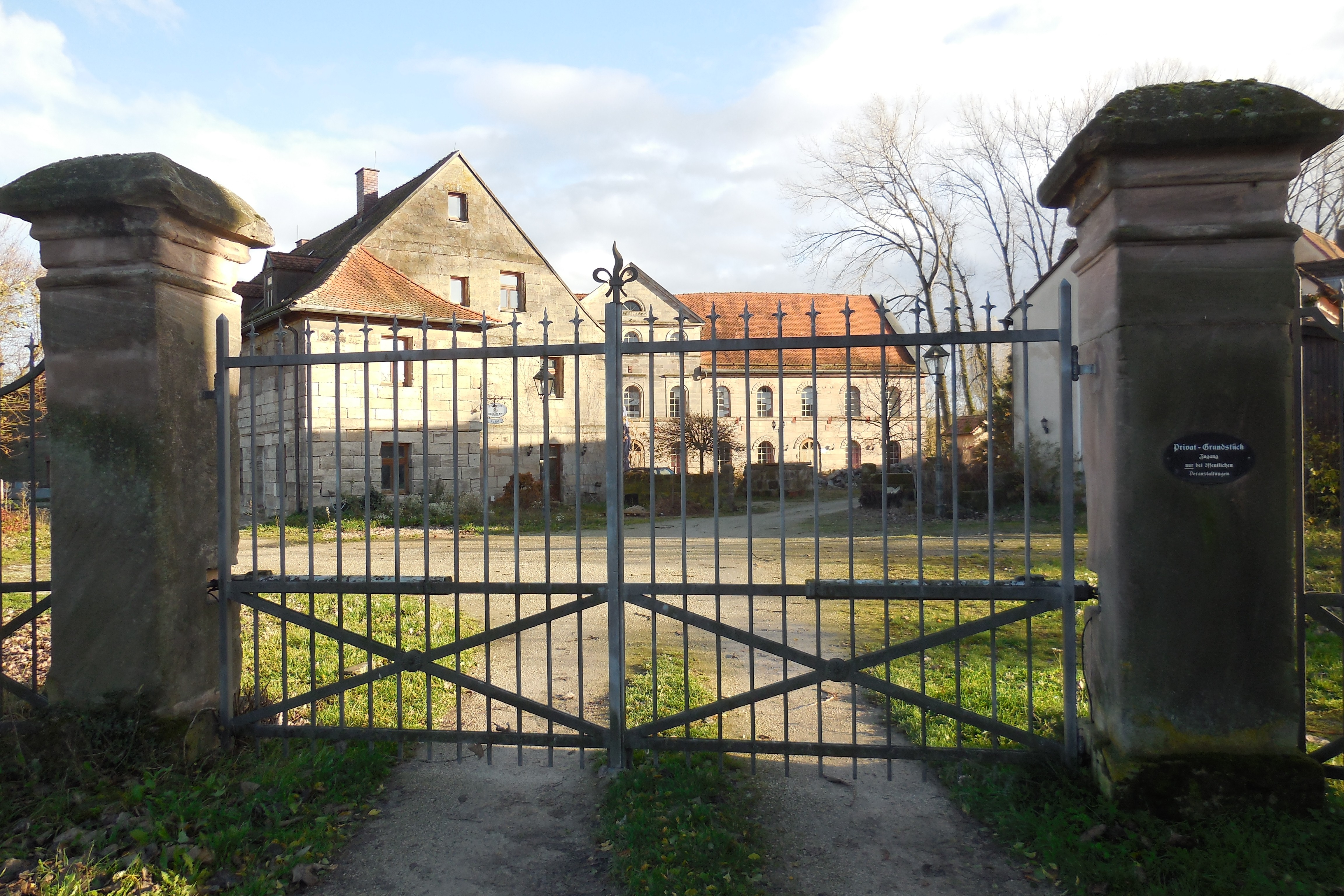 Mühle Möhrendorf-Kleinseebach, 1992–2016 unter der Bezeichnung Mühlentheater als Kleinkunstbühne genutzt